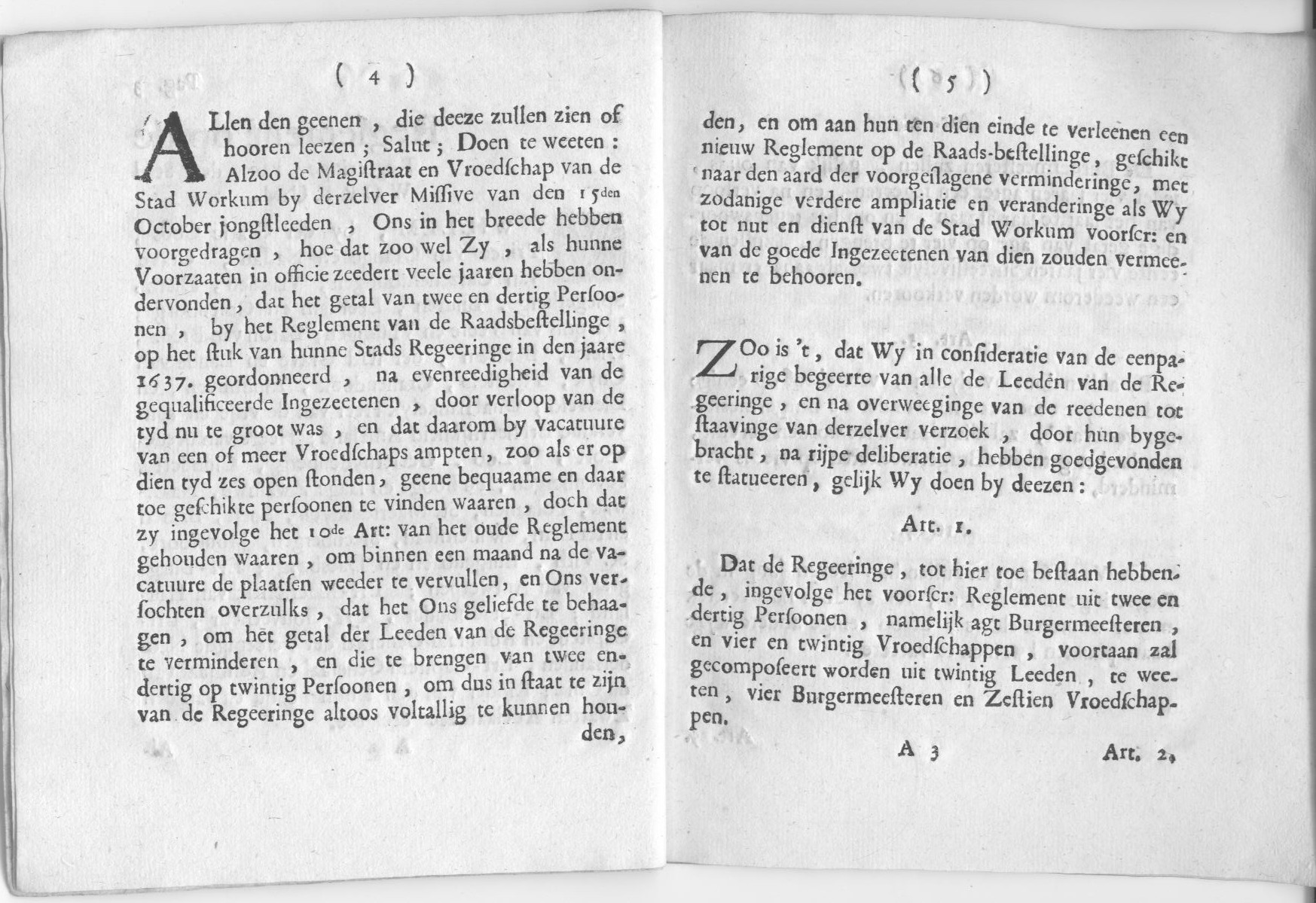 Reglement van Regeringe voor de stad Workum